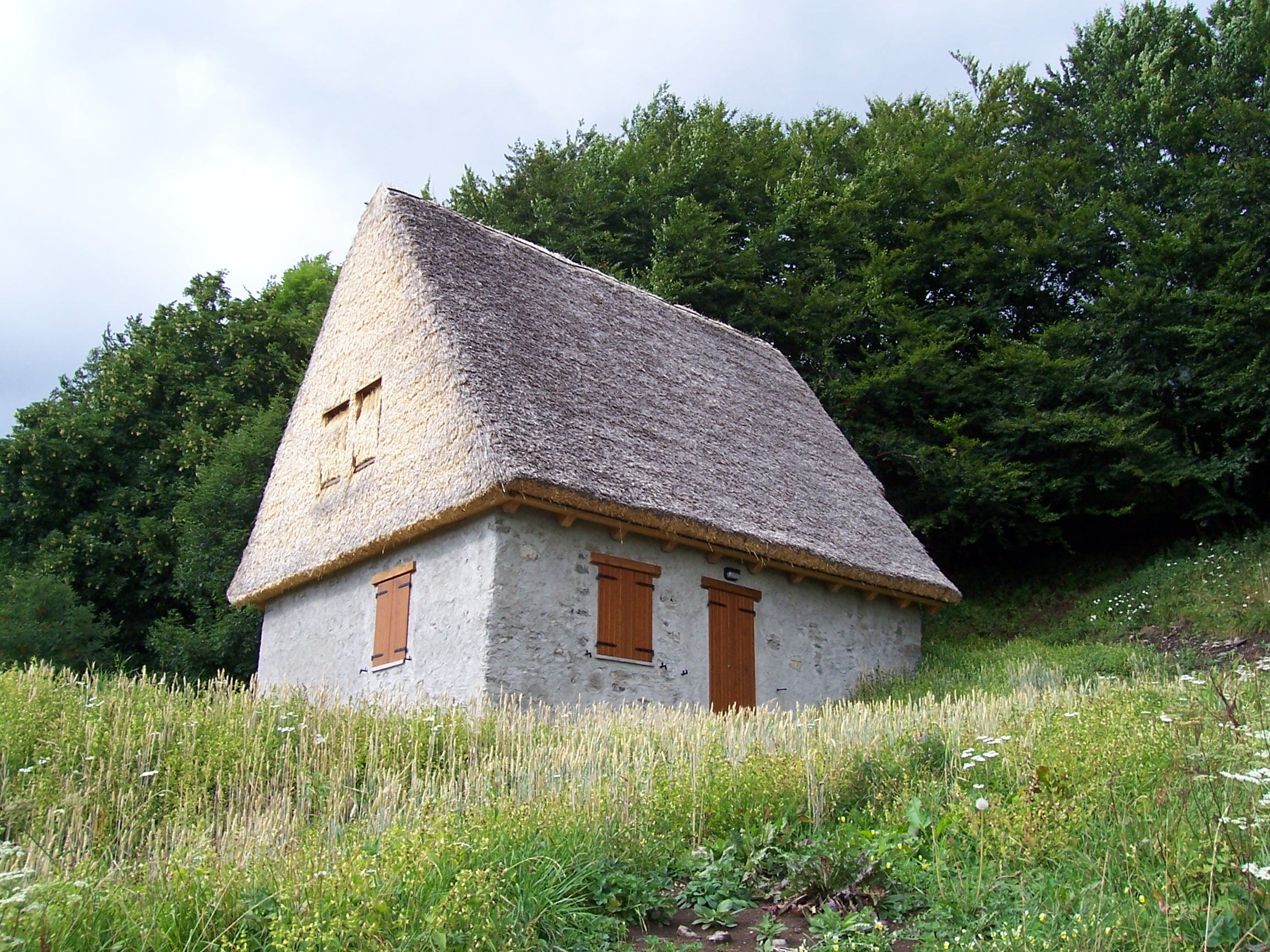 Cadria fotografia Fienile a Cima Rest di Magasa pubblico dominio